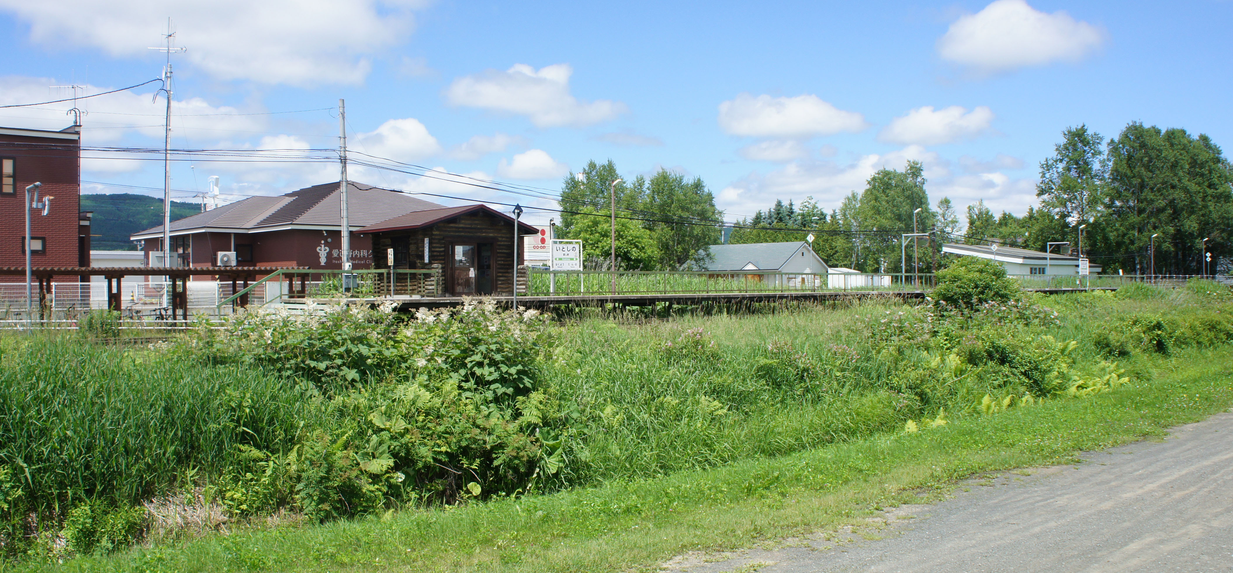 JR石北本線・愛し野駅全体